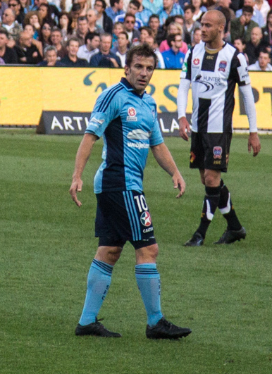 Alessandro Del Piero nella partita tra Sydney FC e Newcastle Jets.